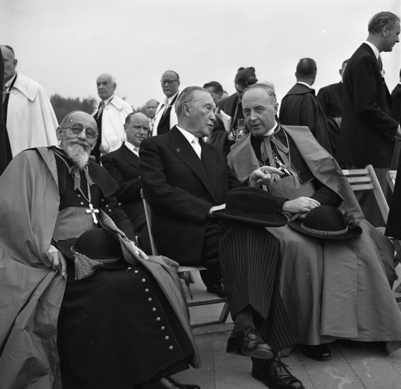 77. Deutscher Katholikentag in Köln Schlusskundgebung